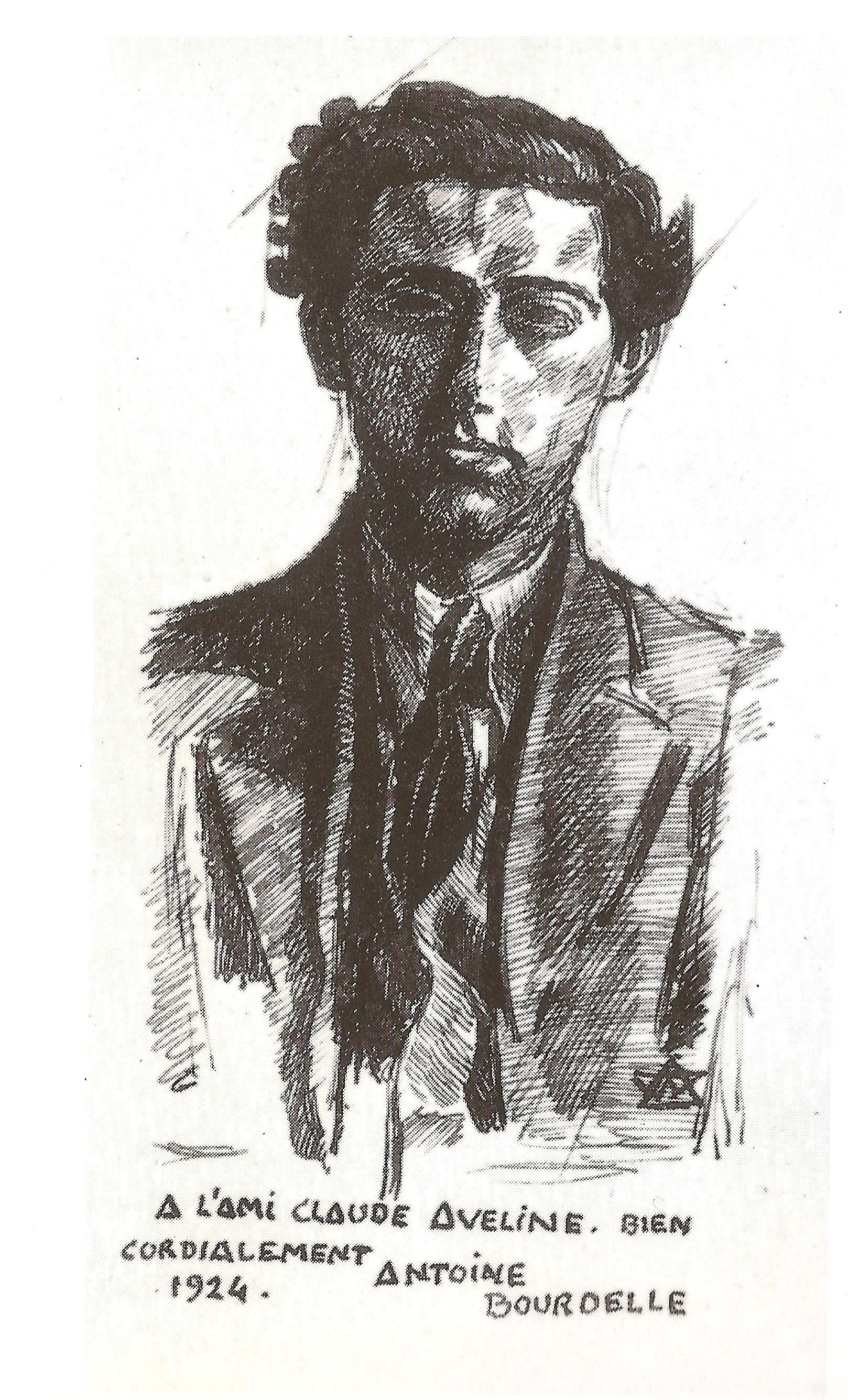 Portrait de Claude Aveline par Antoine Bourdelle (catalogue exposition Aveline)